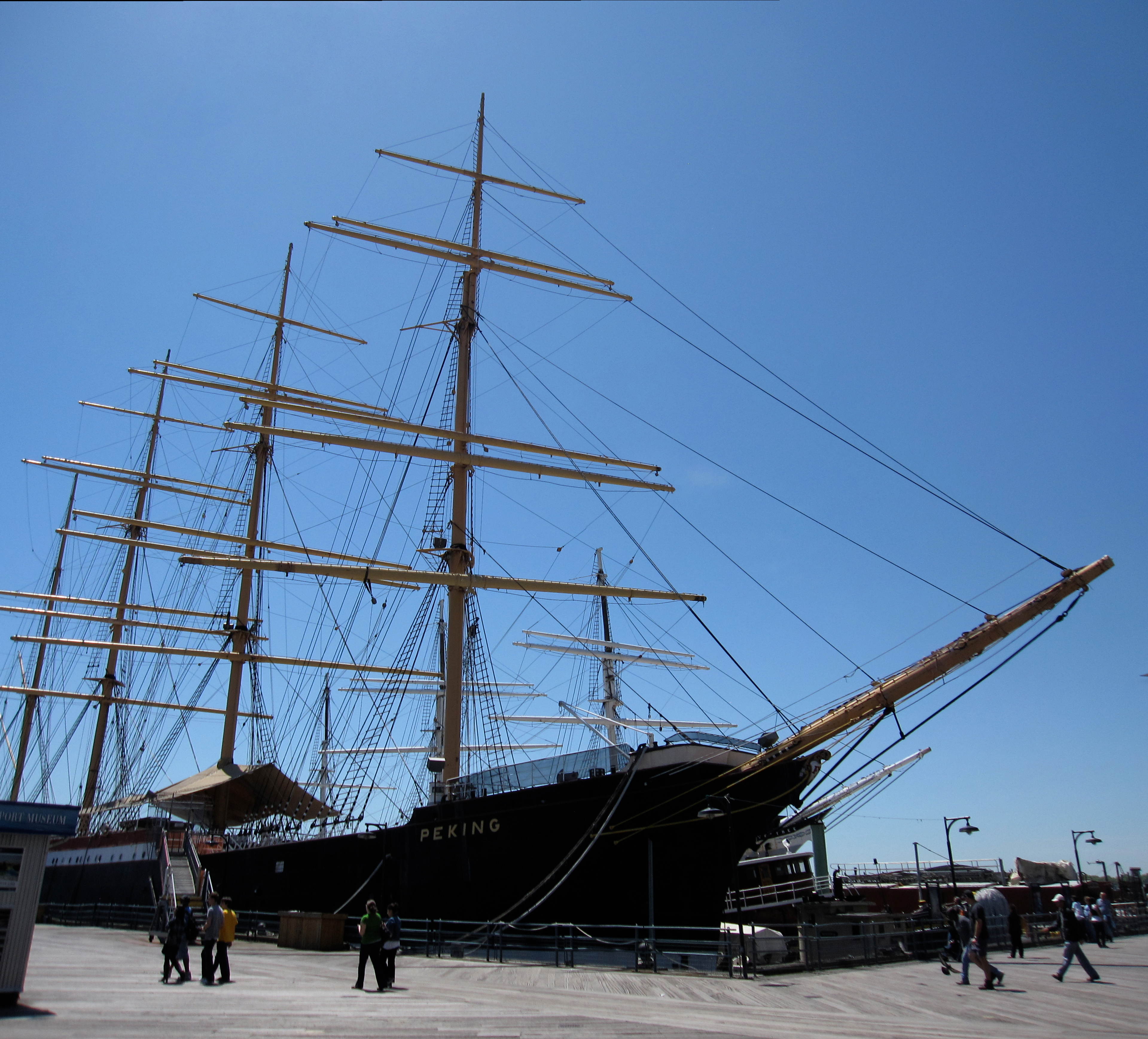 Peking (ship)